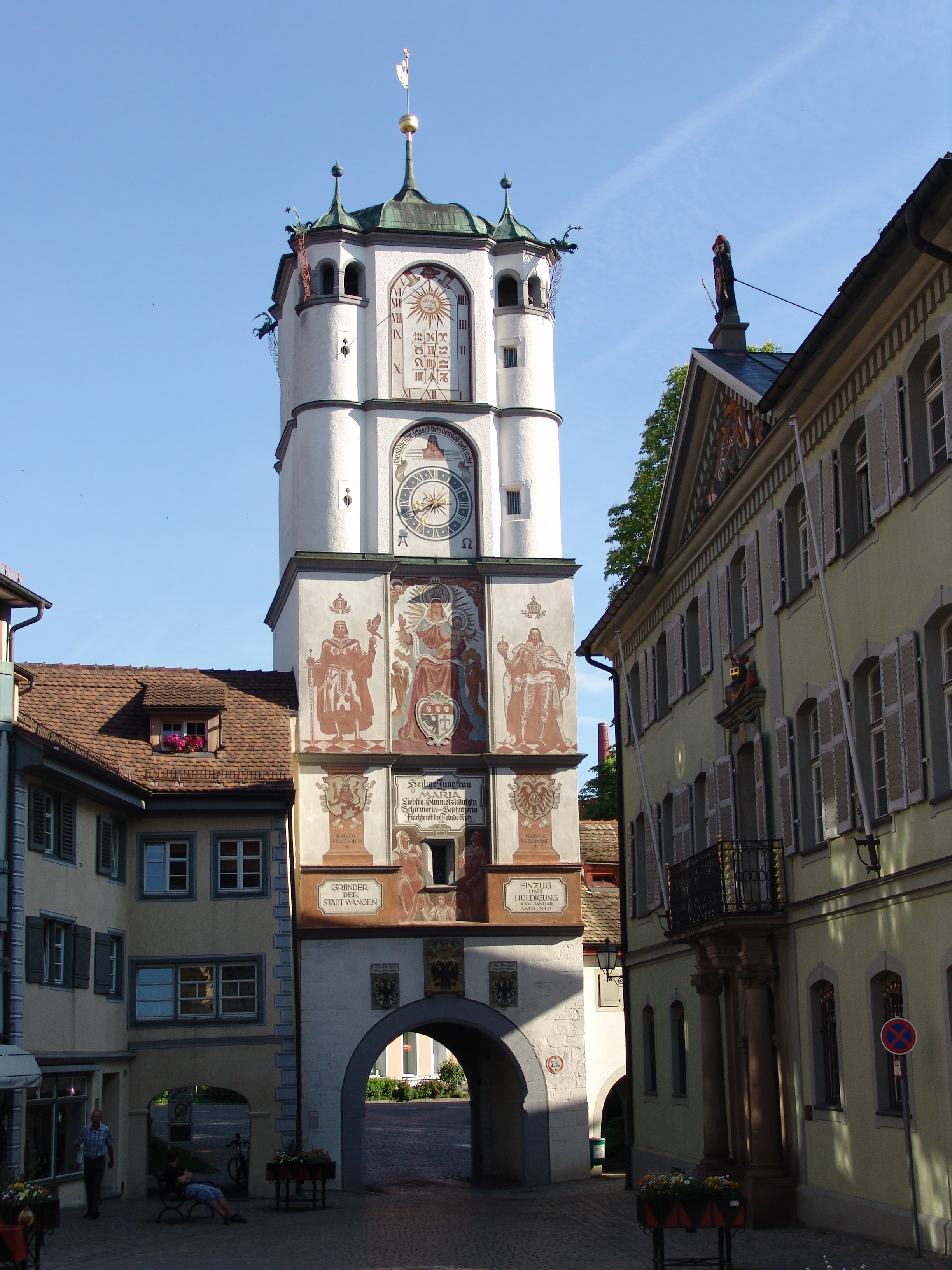 Frauentor Wangen im Allgäu